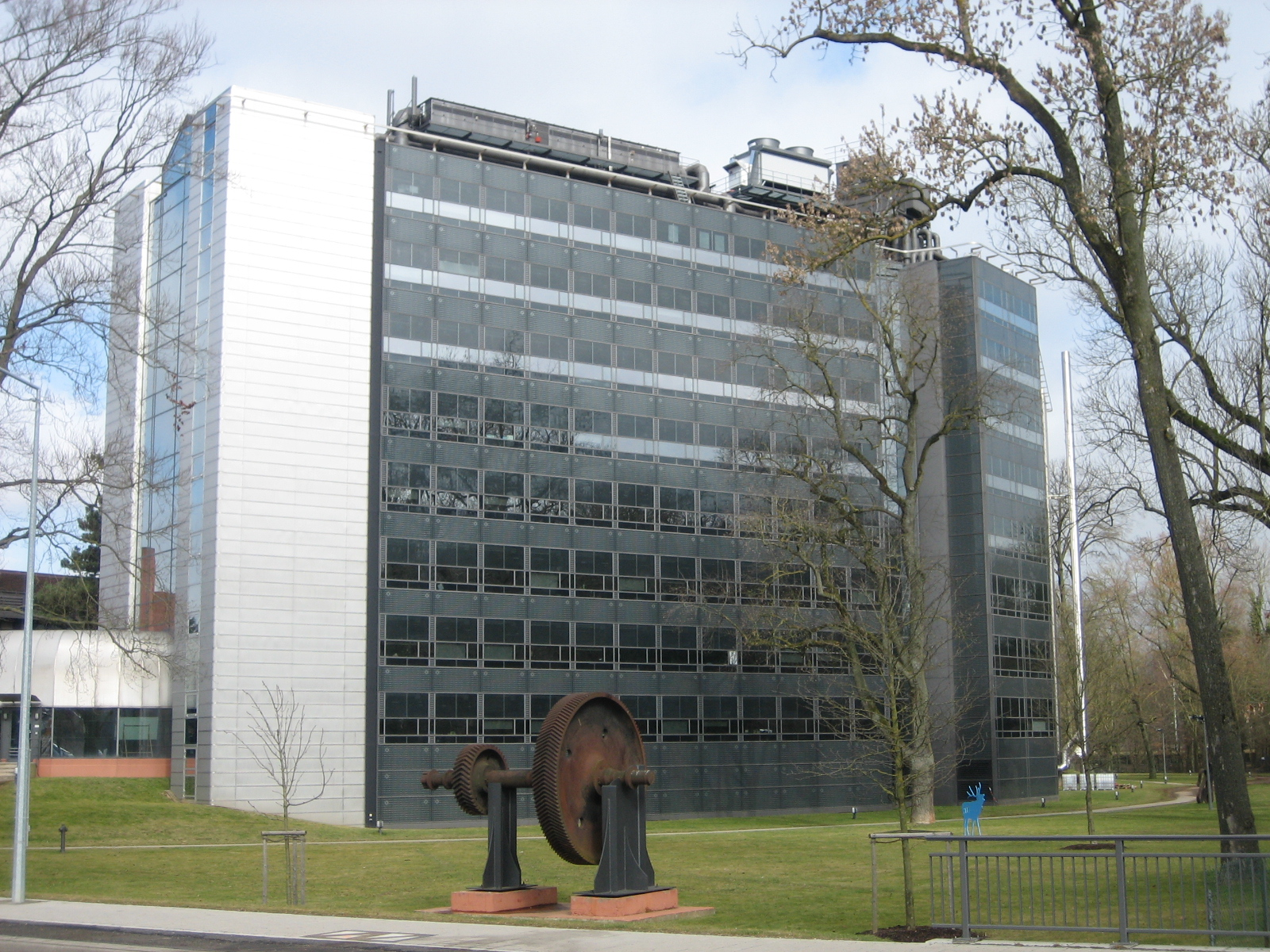 Technoport Schlassgoart, Esch-sur-Alzette, Luxembourg